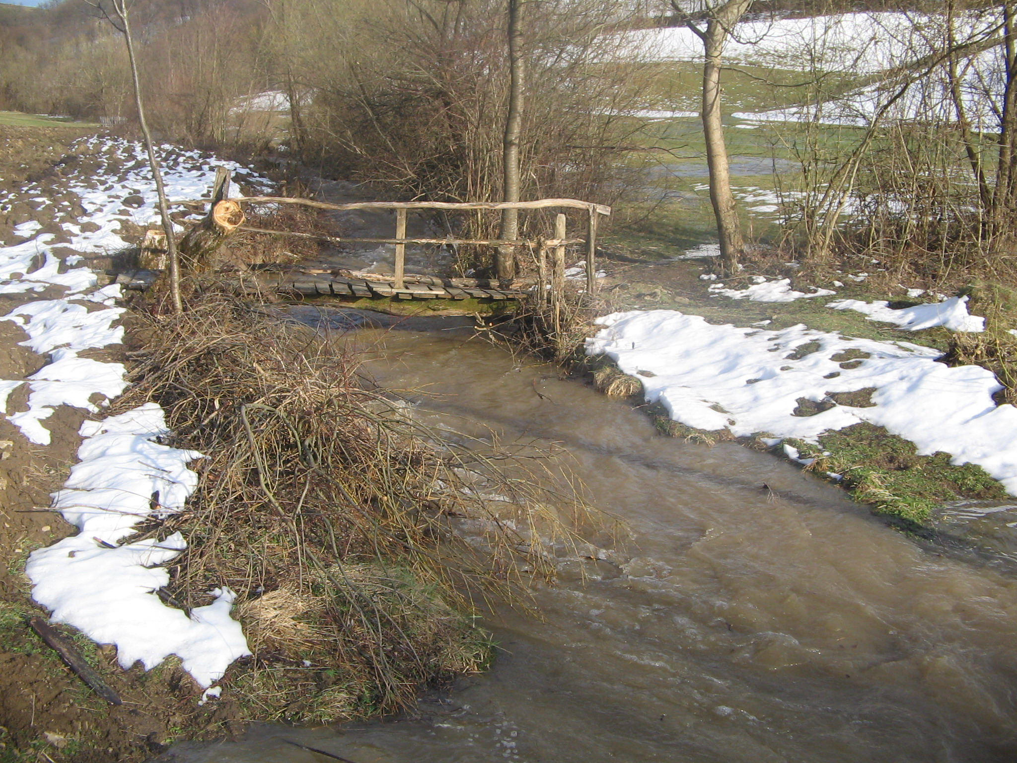 Javorani